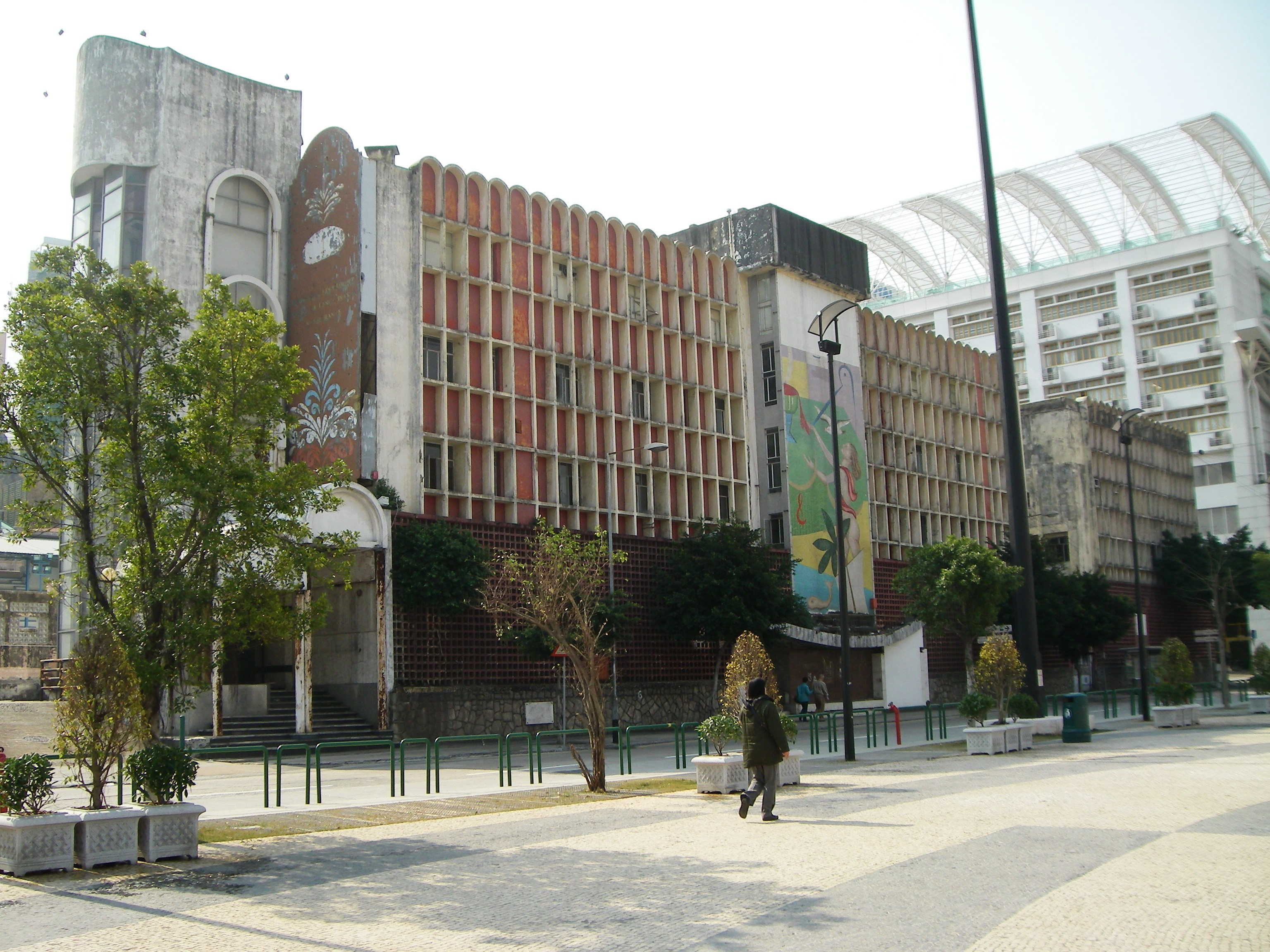 Hotel Estoril, Macau